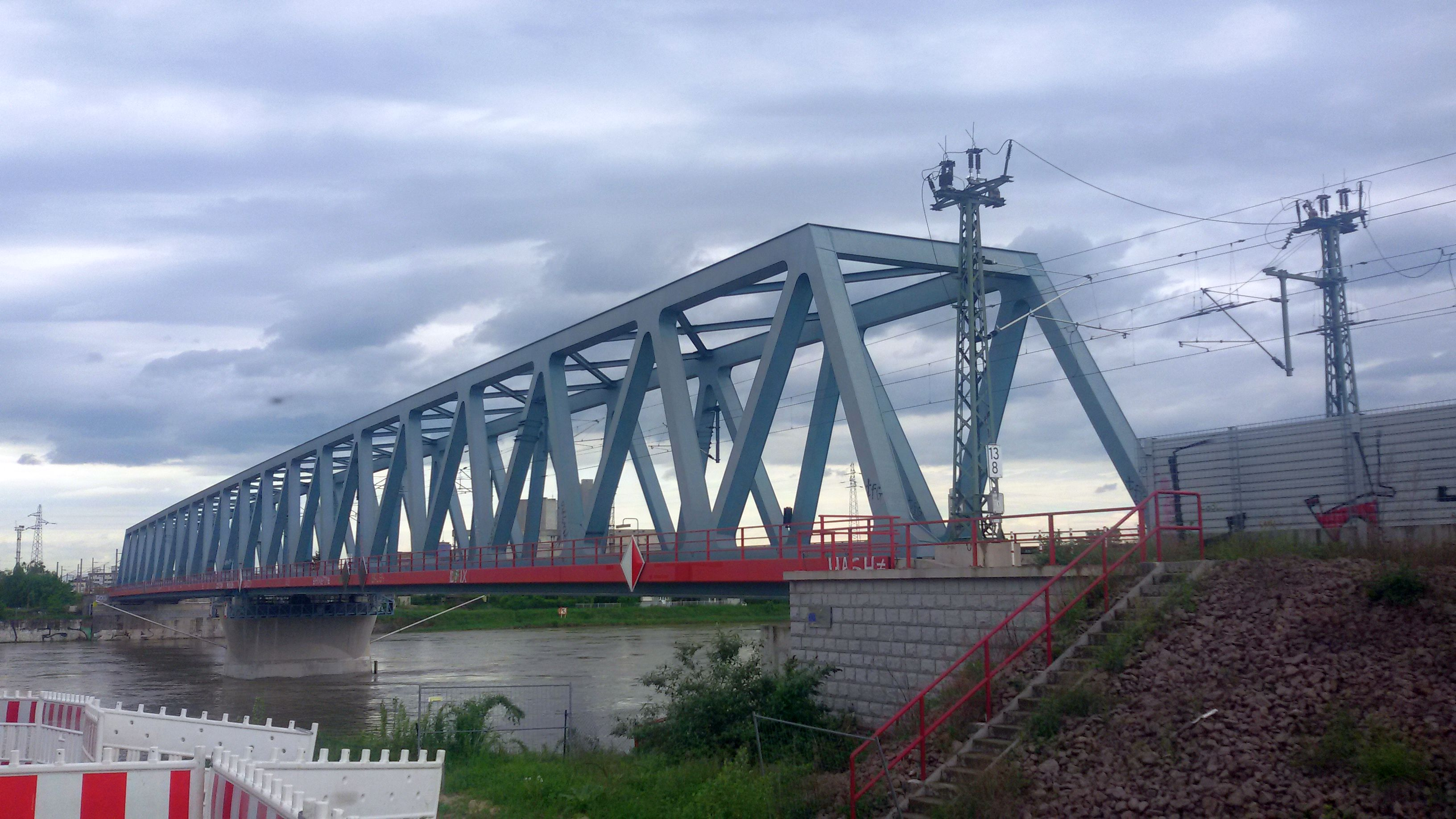 Eisenbahnbrücke nach ihrer Errichtung